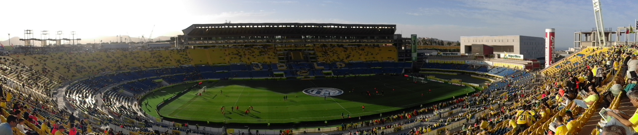 Panorámica del estadio de Gran Canaria desde la grada Sur durante el previo del UD Las Palmas-Sporting del 7 de enero de 2017